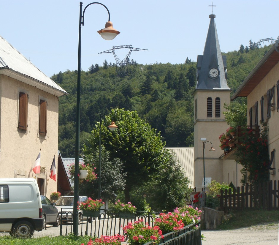 Vue du village de Beaufin (Isère) : à gauche la mairie, au fond l'église.